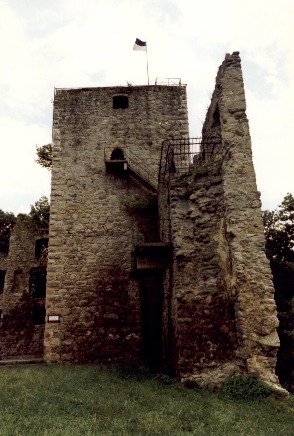 Burg Neu-Windeck, Bergfried. Die Burg Neu-Windeck, auch Burg Neuwindeck, Burg Lauf oder Laufer Schloss genannt, ist eine Burgruine auf dem Schlossberg, einer Anhöhe südöstlich von Lauf im Ortenaukreis in Baden-Württemberg.